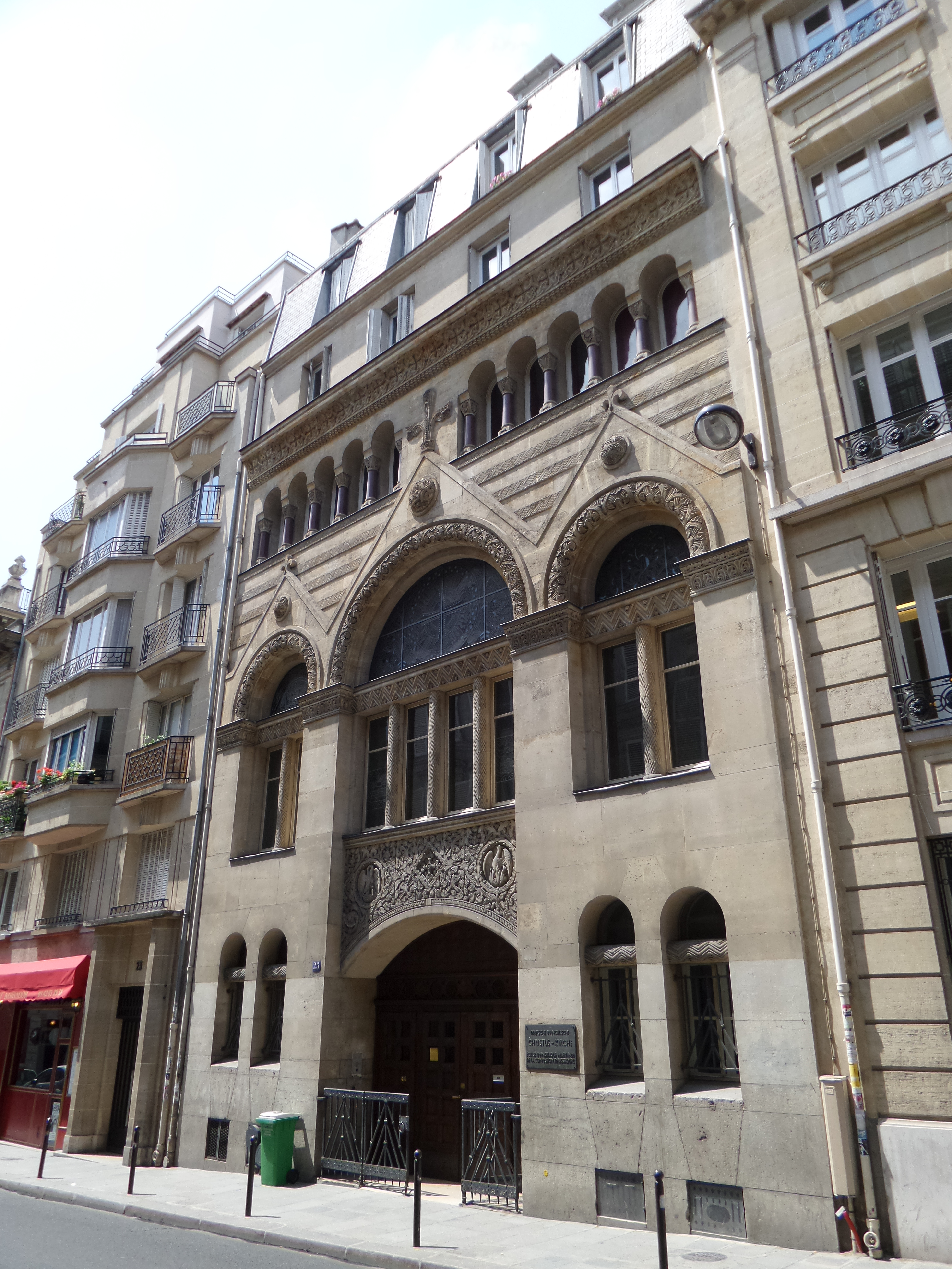 Église évangélique allemande de Paris